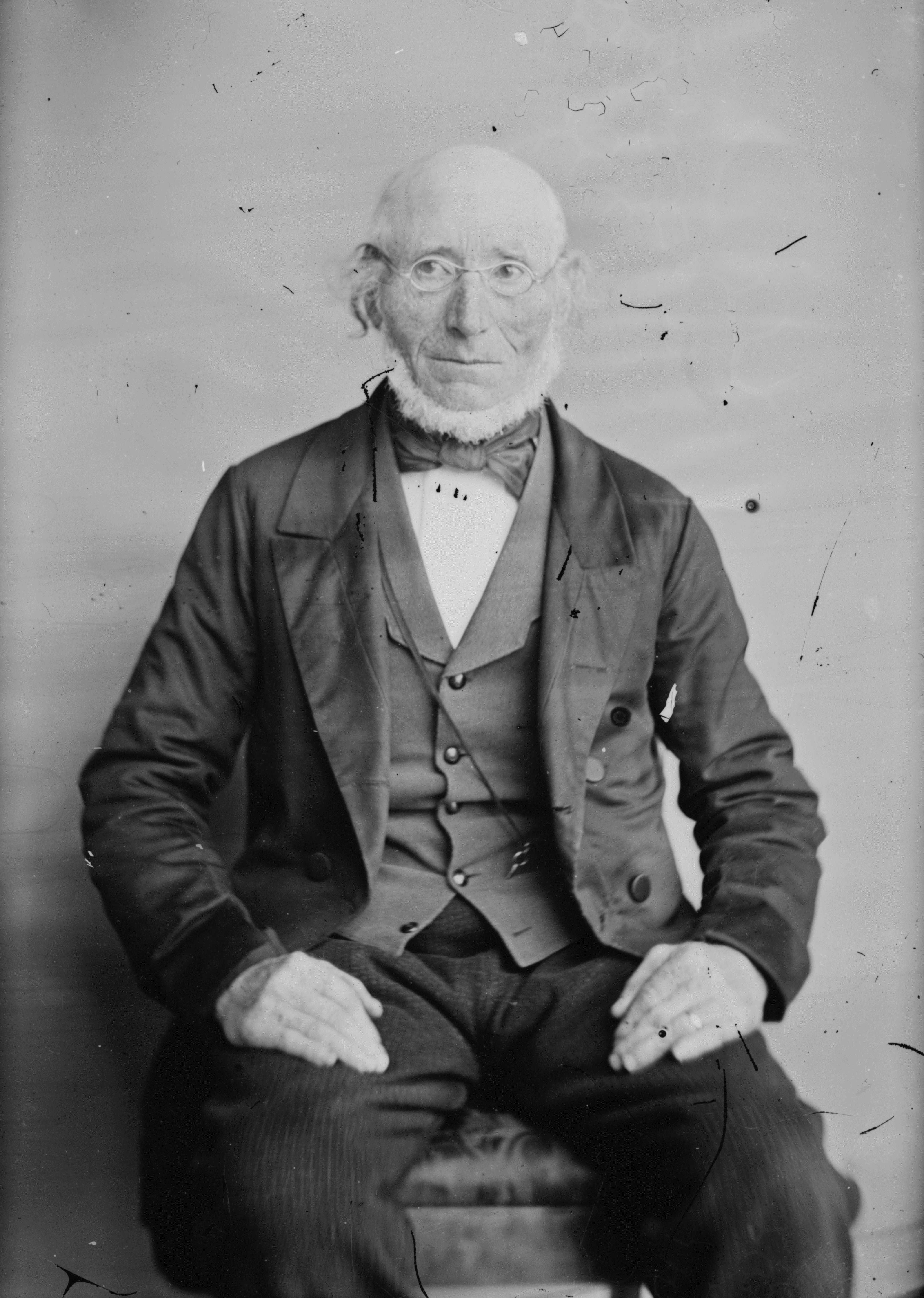 Ole Eide (1802–1866), farver og ordfører i Levanger by i 1854.